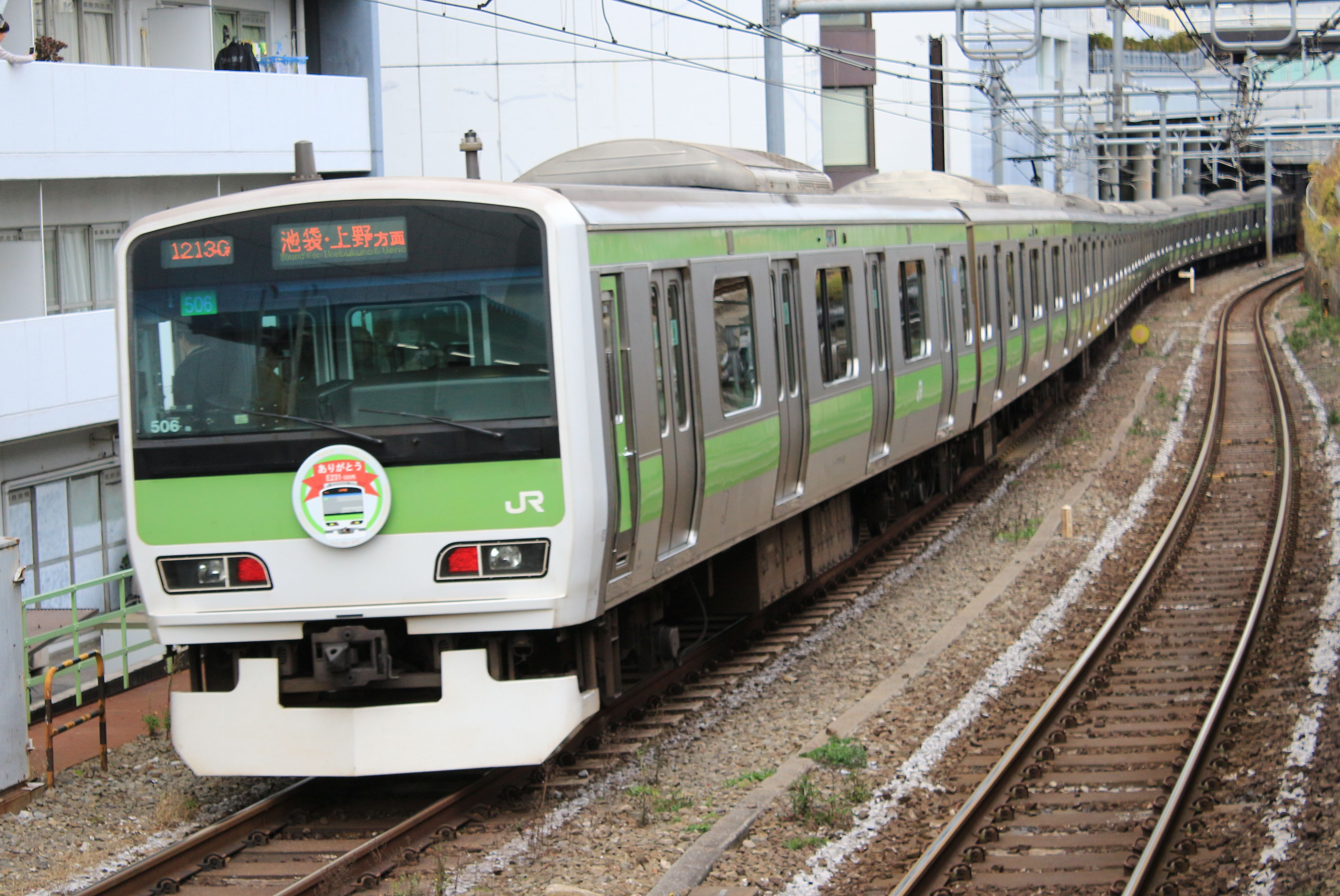 1213G E231系500番台東トウ506 ありがとうE231-500代マーク付き